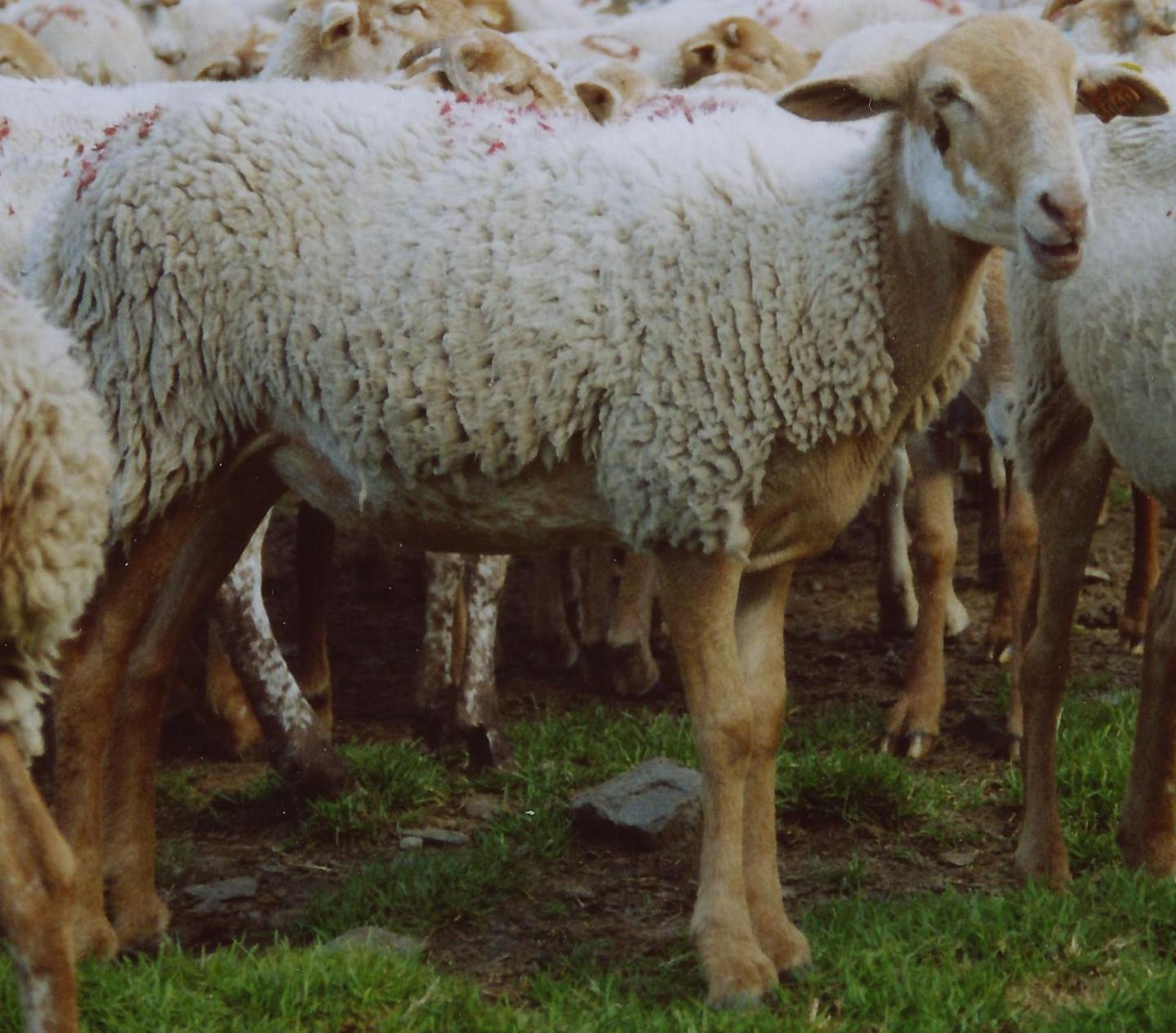 Brebis castillonnaise à tête rousse. Troupeau de Baniel Chertier à uretz (Ariège)